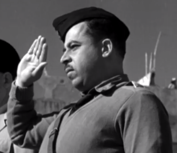 Muhammed Nimer Hawari at Nejada march Jaffa 1947